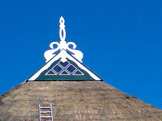 Volkunststof oeleboerd van